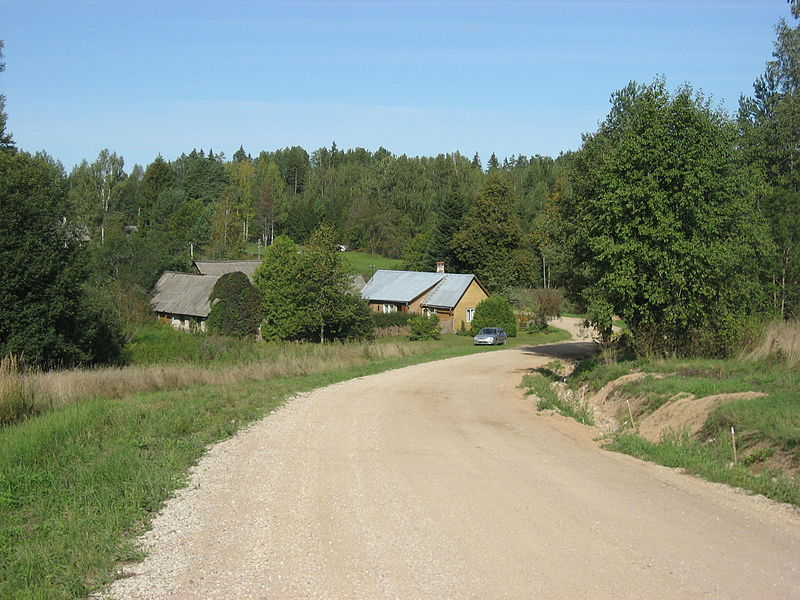 Võro: Naruskikülä ja Himmakülä piir Naruskikülä puult kaiõn.